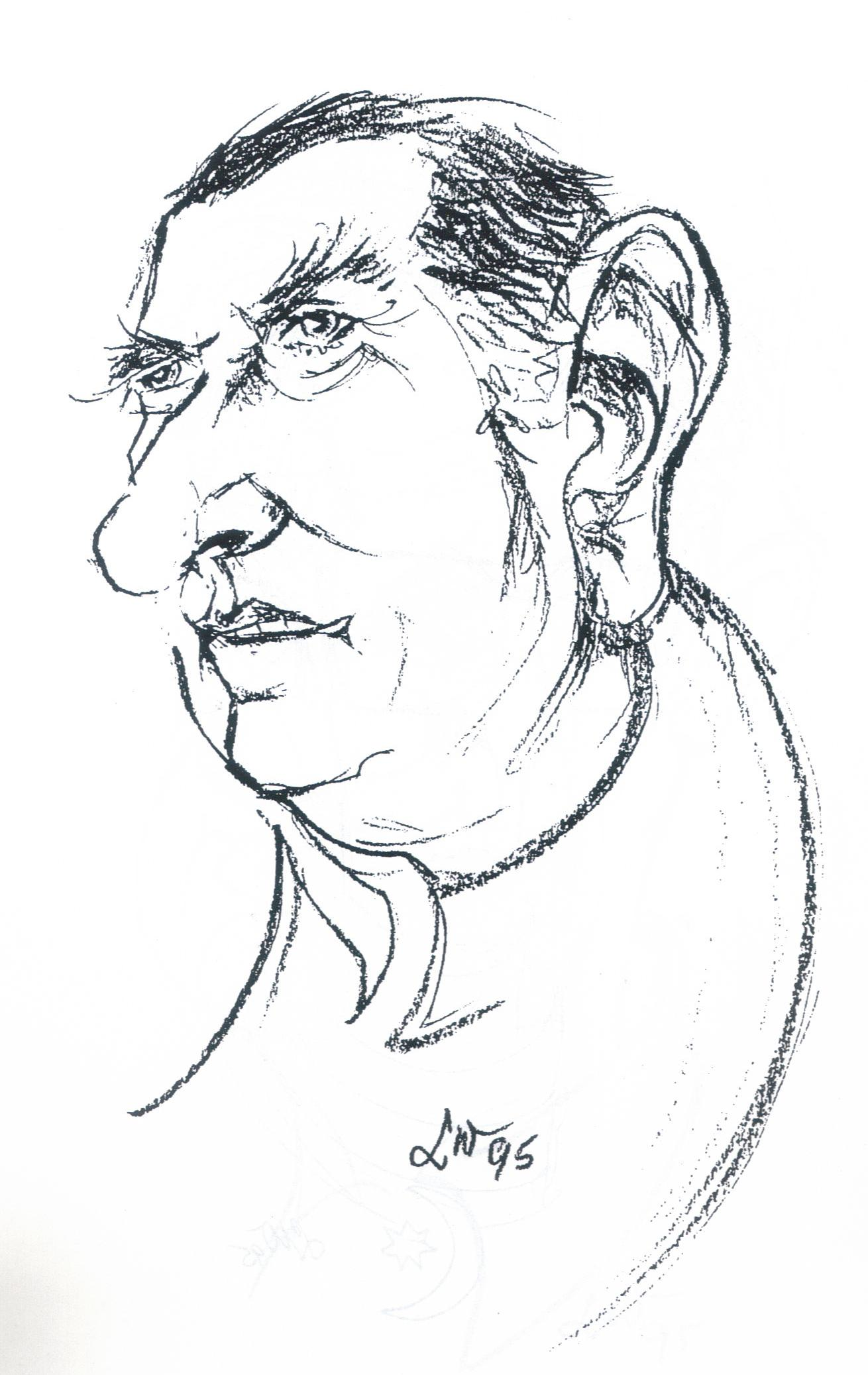 Leszek Woźniak himself